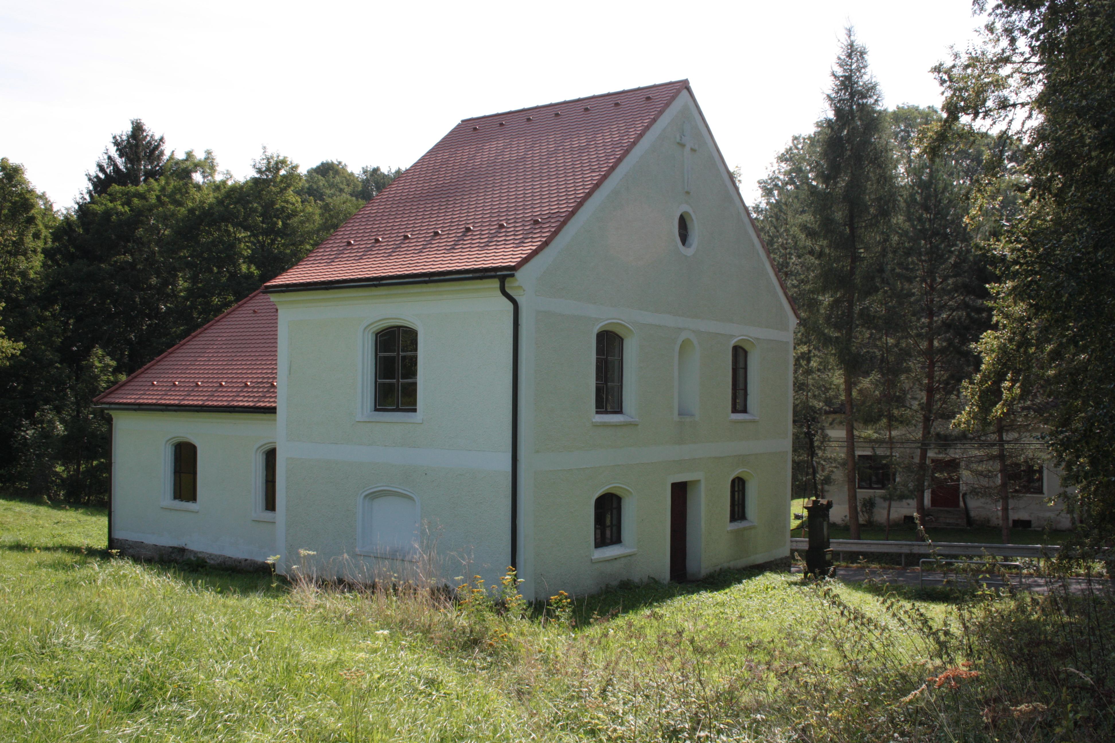 Pohled od severu na kapli Panny Marie Sněžné v Srbské. Postavena byla v barokním stylu roku 1724 a roku 1902 byla novobarokně upravena. This photograph was taken with a DSLR from WMCZ's Camera grant.